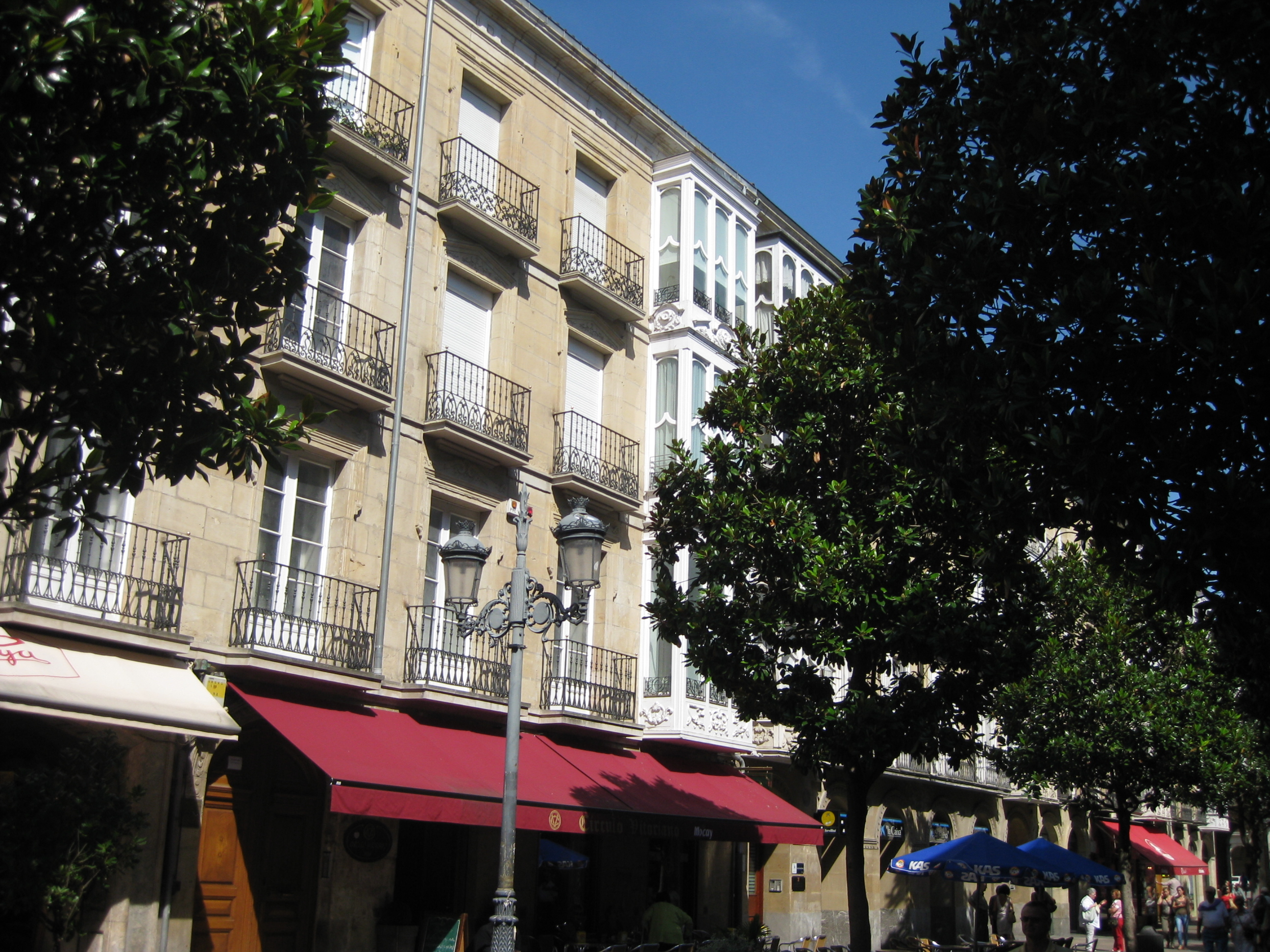 Calle Eduardo Dato en el Ensanche de Vitoria-Gasteiz